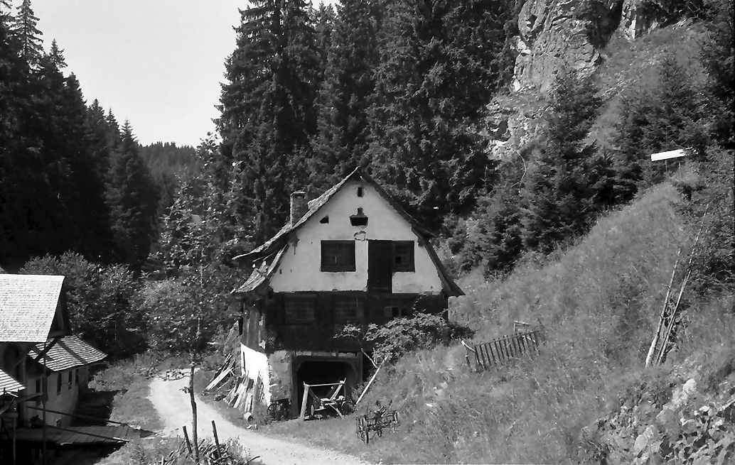 Schleifensäge im Haslachtal. Rechts Markierung des Stauziels